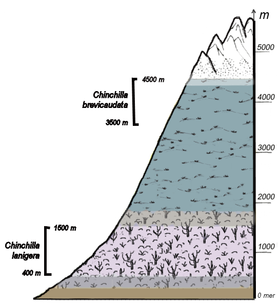 Wild Chinchillas are living in upper parts of Andinas mountains / L'habitat des chinchillas sauvages dans les Hautes et très hautes Andes.